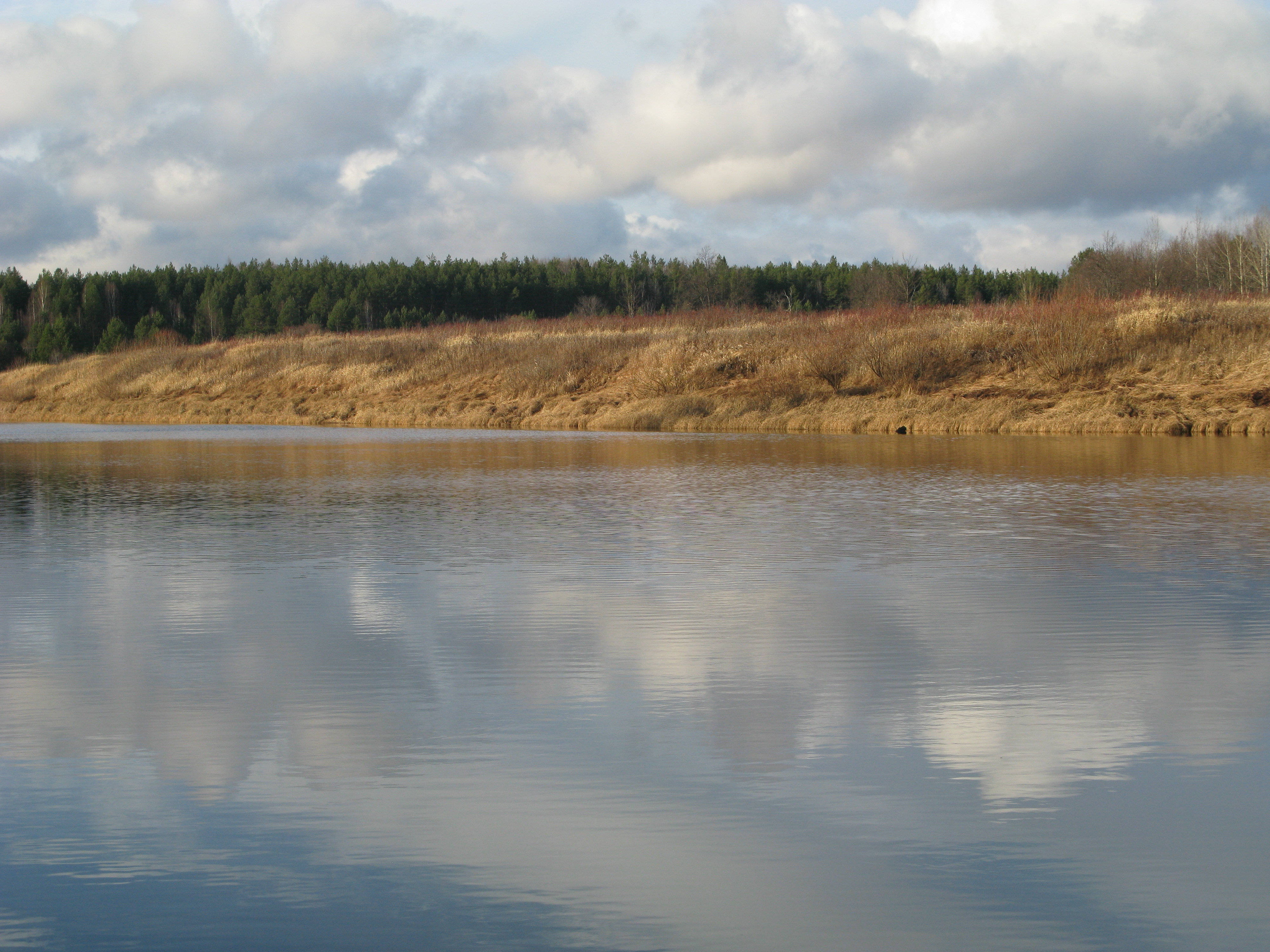 Вид, который можно наблюдать осенью, если находиться в деревне Рязанка